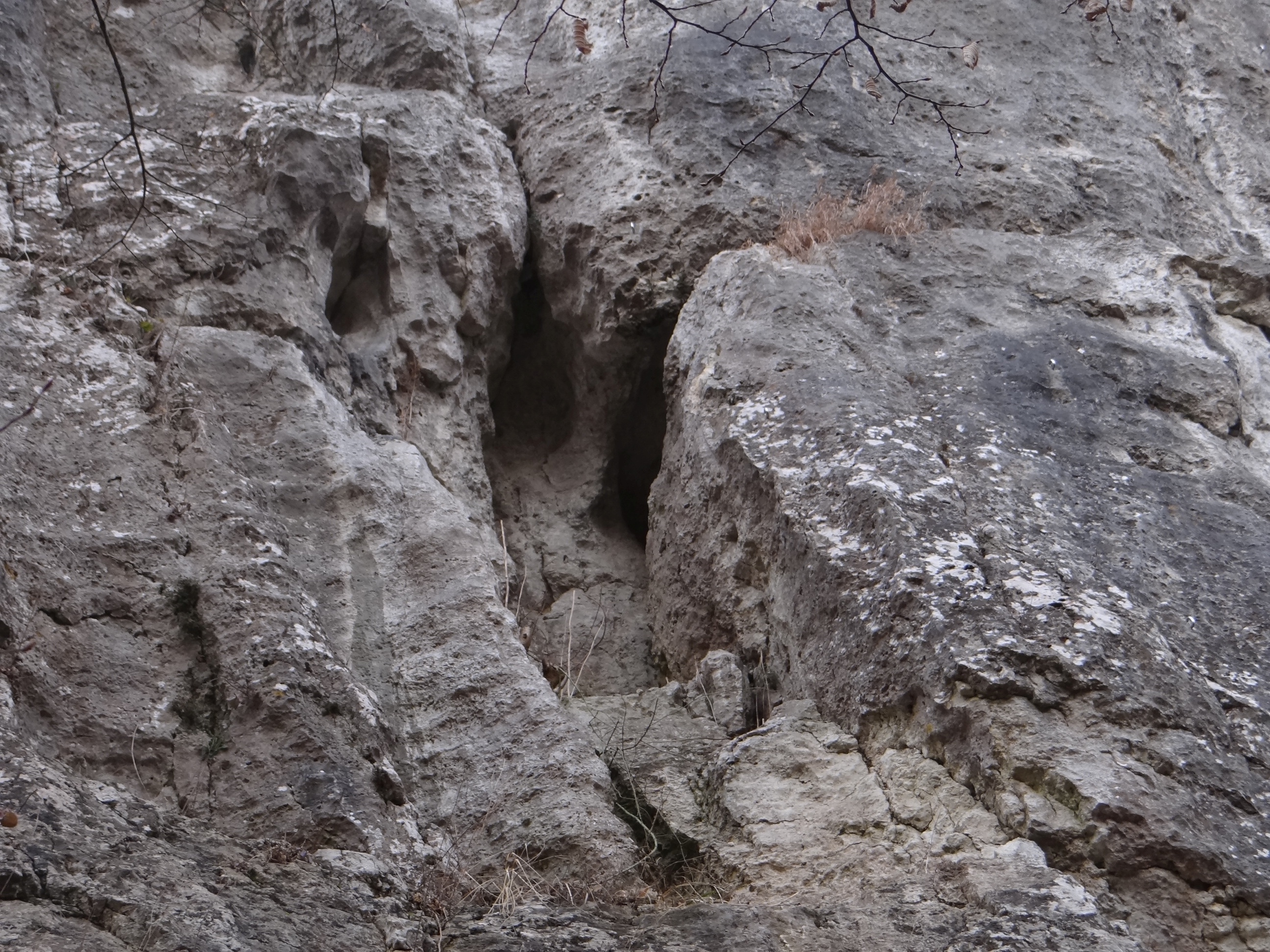 Meander w Leśnej Baszcie